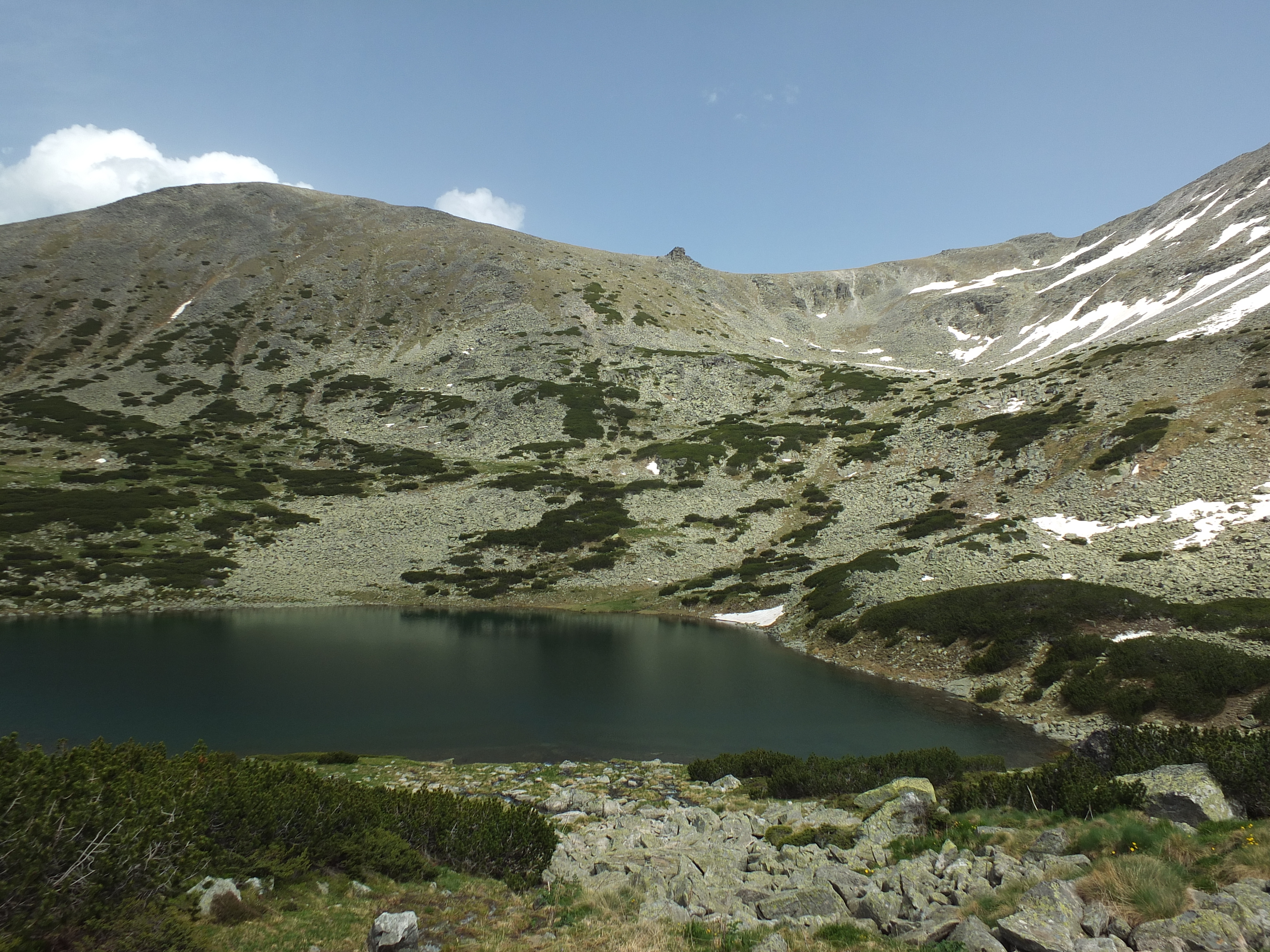 Рила, Рила